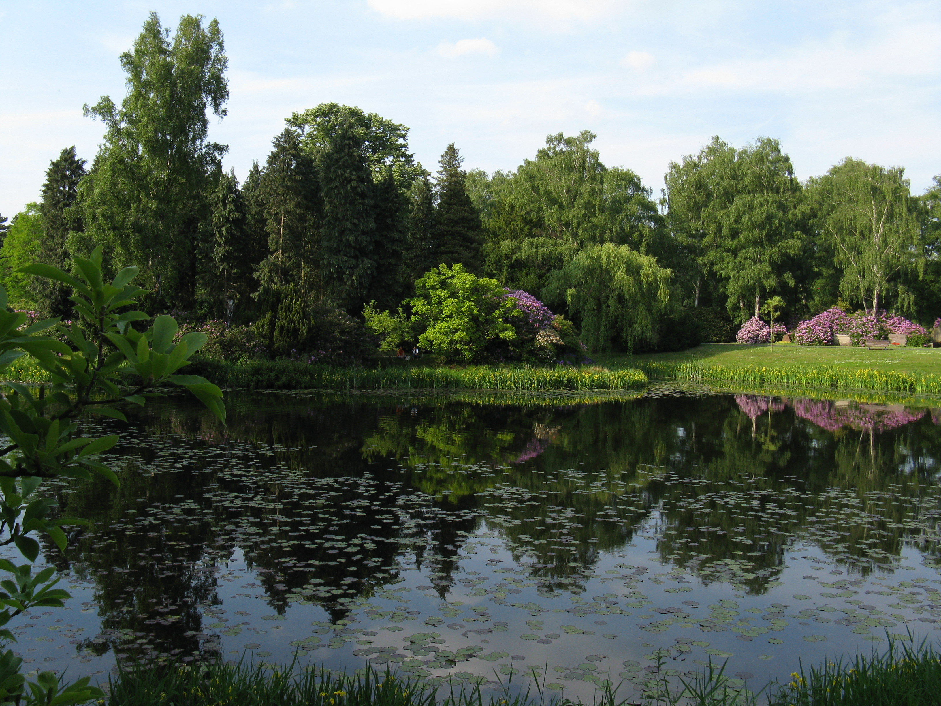 Stöckener Friedhof in Hannover: See (Blick auf die Urneninsel)